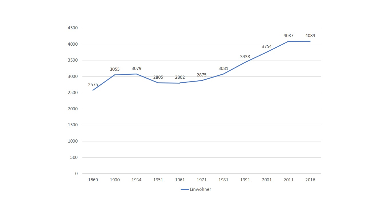 Die Bevölkerungsentwicklung in Ried in der Riedmark, Daten der Statitik Austria entnommen, mit PowerPoint erstellt.